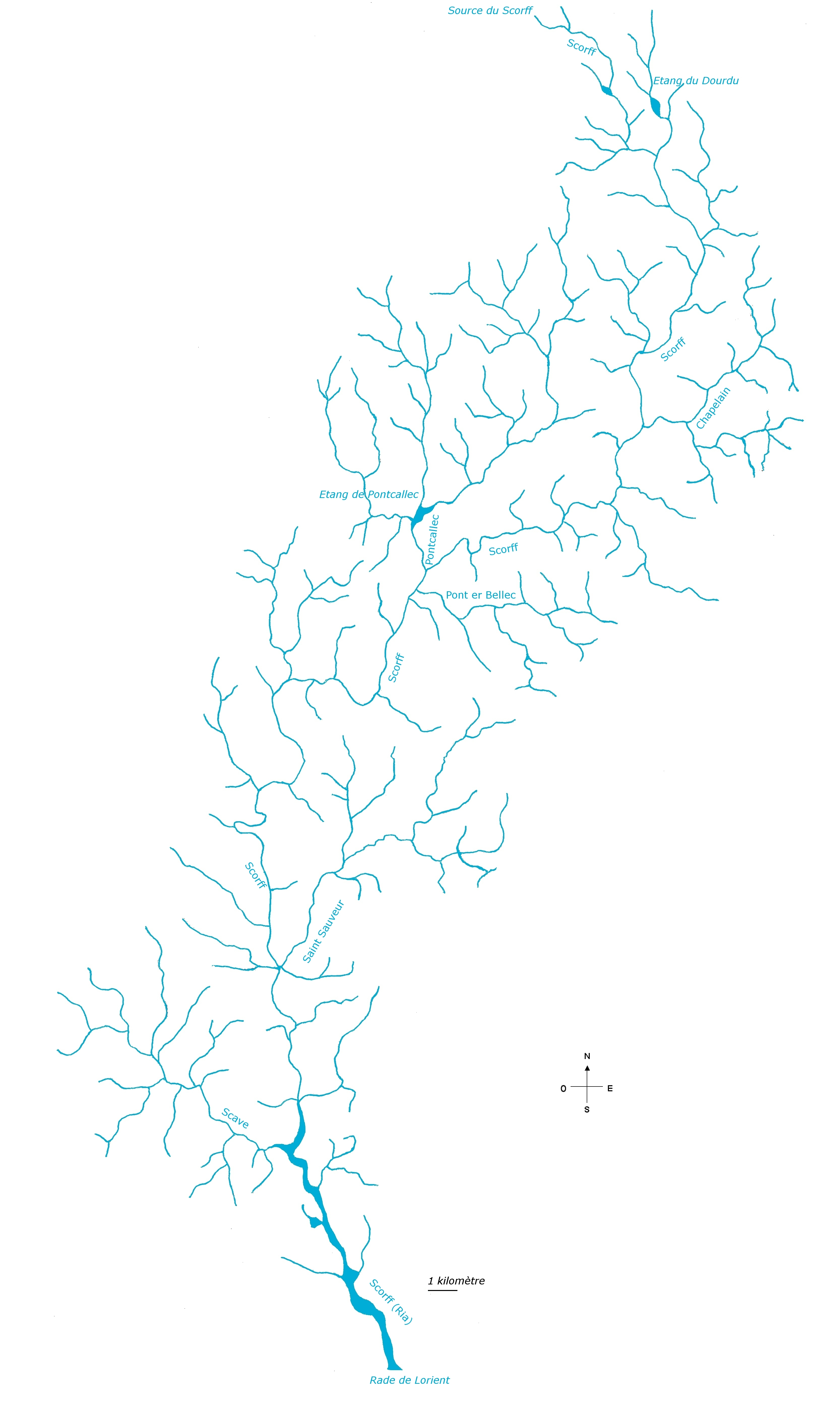 carte hydrographique du Scorff et de ses affluents